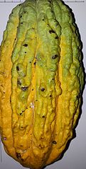 Cabosse hybride obtenu par pollinisation artificielle